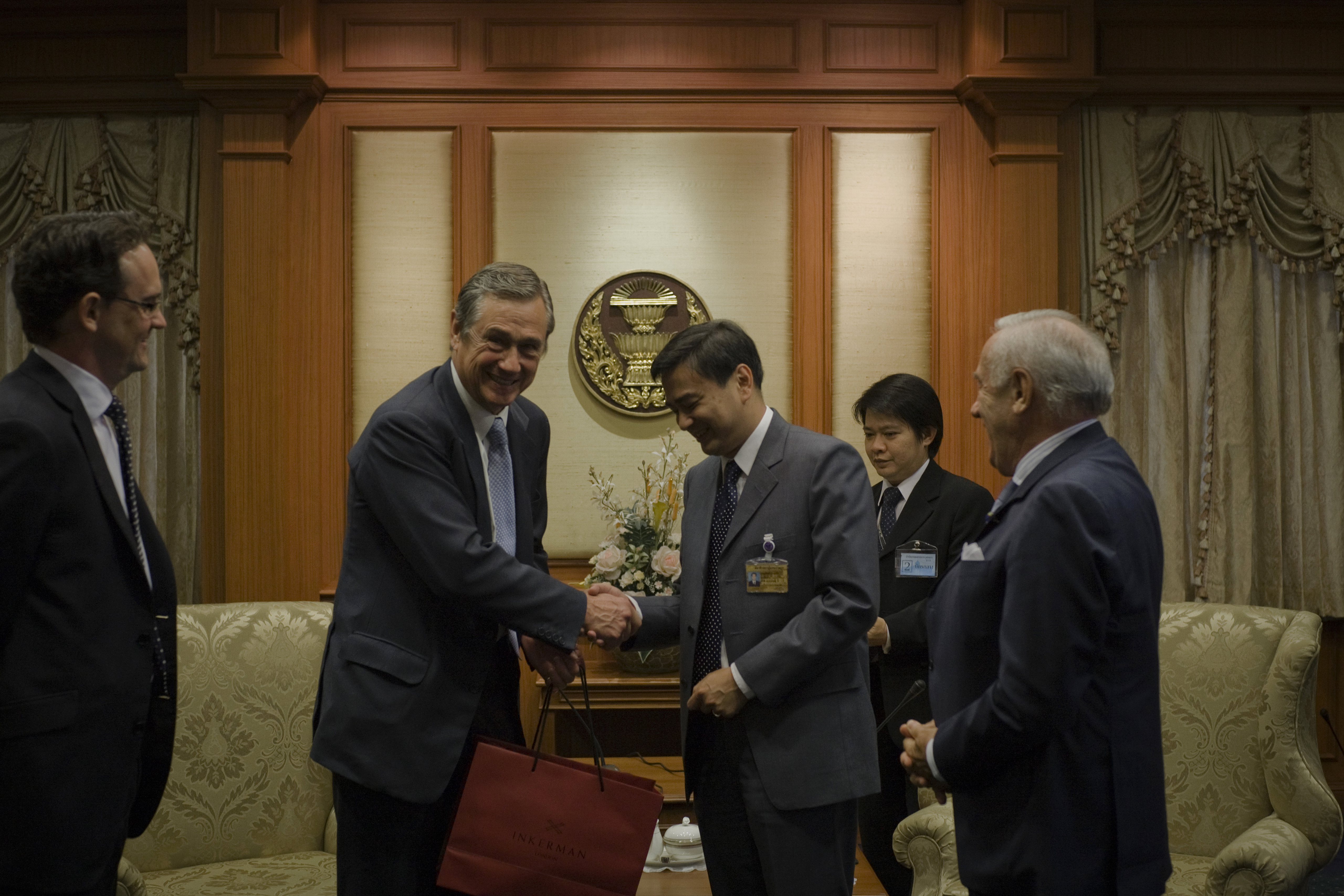 Sir Simon Robertson กรรมการบริหารบริษัท Rolls-Royce สหราชอาณาจักร เข้าเยี่ยมคารวะนายกรัฐมนตรี ณ ห้องรับรอง 2 อาคารรัฐสภา 1 ถนนอู่ทองใน วันพุธ ที่ 27 ตุลาคม พ.ศ.2553 (Photographer attached to the Prime Minister of the Kingdom of Thailand : Peerapat Wimolrungkarat / พีรพัฒน์ วิมลรังครัตน์)（2010年10月27日，英國罗尔斯·罗伊斯董事會非執行主席西蒙·羅拔臣爵士，以及泰國總理阿披實·威差奇瓦於國會接待會面）